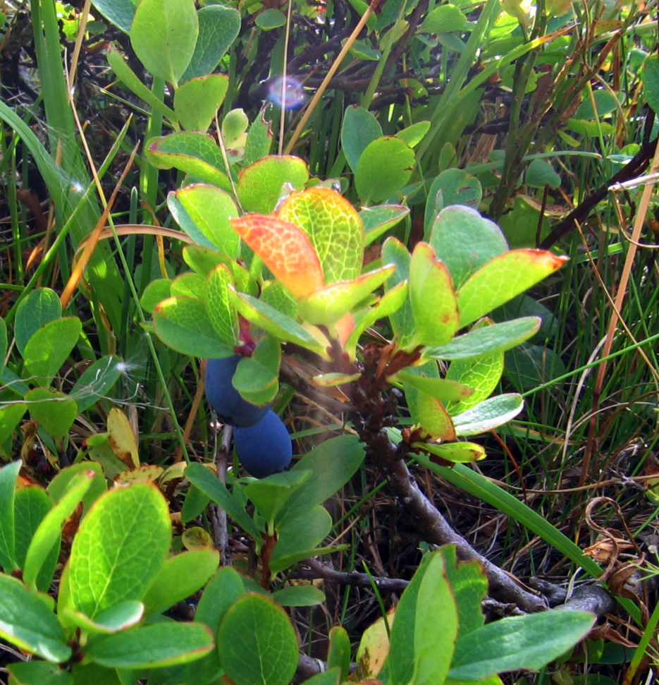 Borovnice iz Biogradske gore